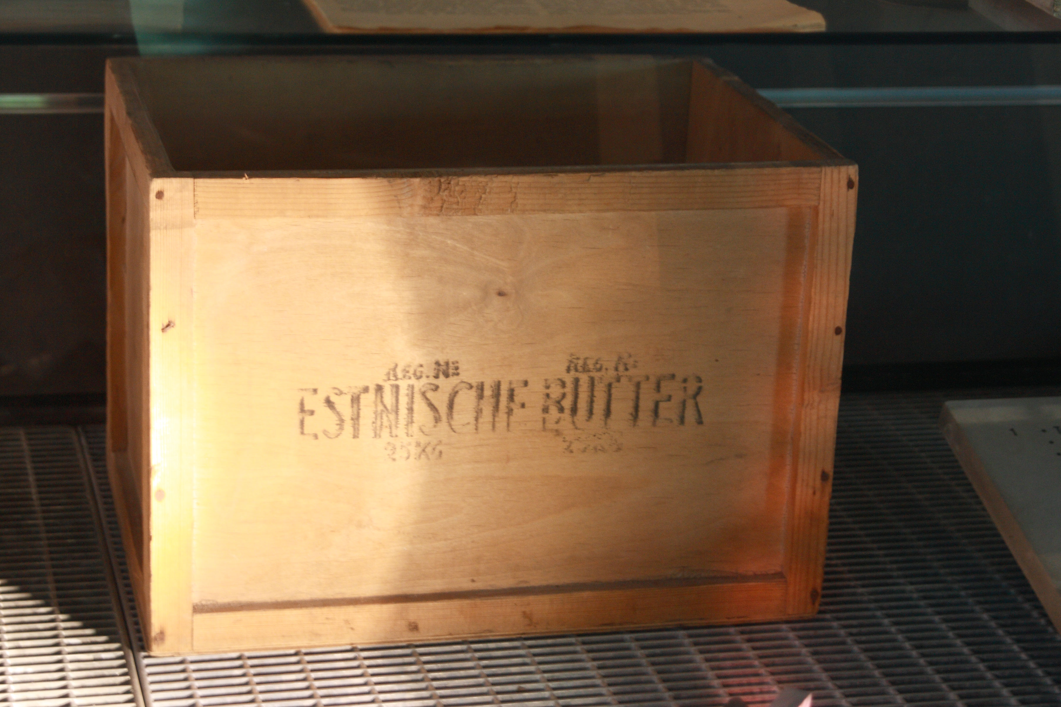 Eesti eksportvõi kast